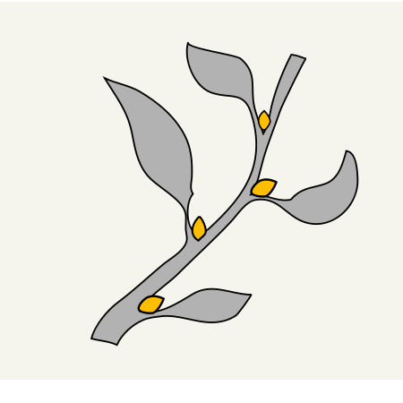 Morfología de la planta. Yemas axilares (en amarillo). De File:Plant Buds clasification.svg